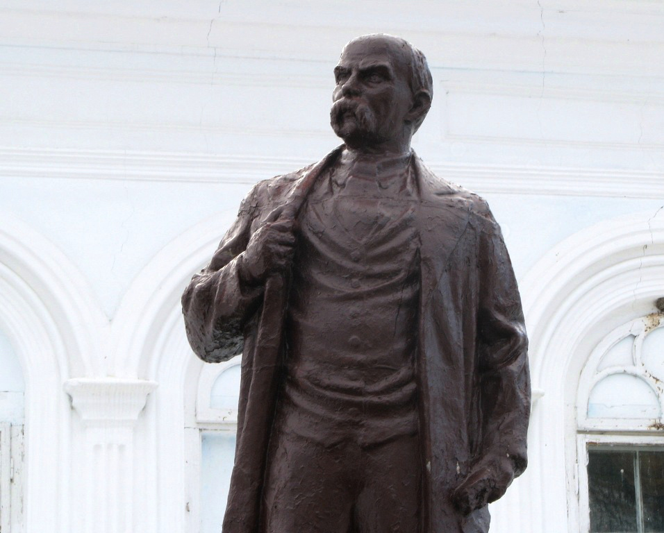 Пам'ятник Шевченку